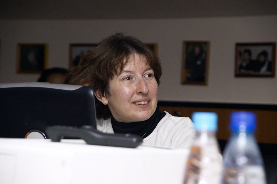 Анна Владимировна Дыбо на Конференции памяти В. М. Иллич-Свитыча в Москве 21-23.10.2004.